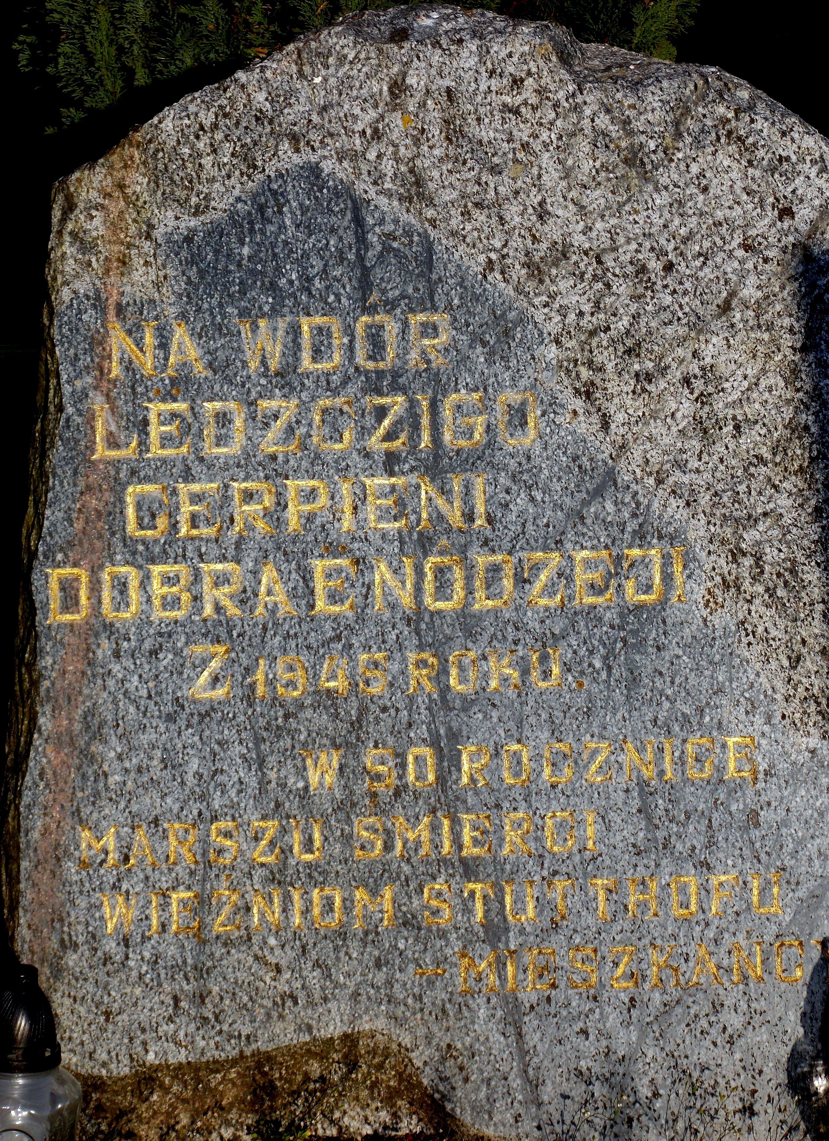 Kamień znajdujący się przed Szkołą Podstawową w Kętrzynie, upamiętniający 50 rocznicę Marszu Śmierci więźniów obozu koncentracyjnego Stutthof (1945).